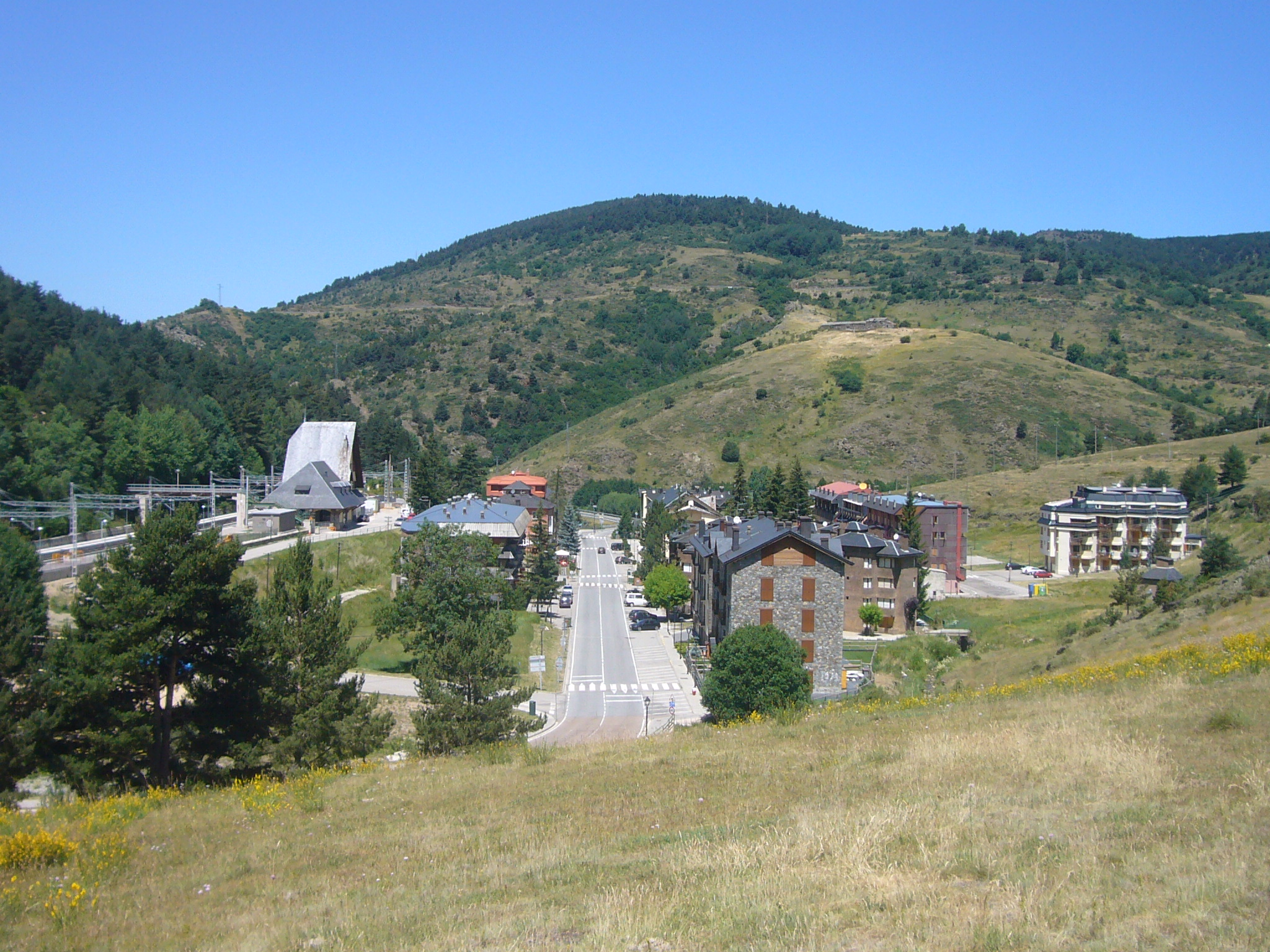 Vista del barri de l'estació de tren de la Molina (Girona, Catalunya).